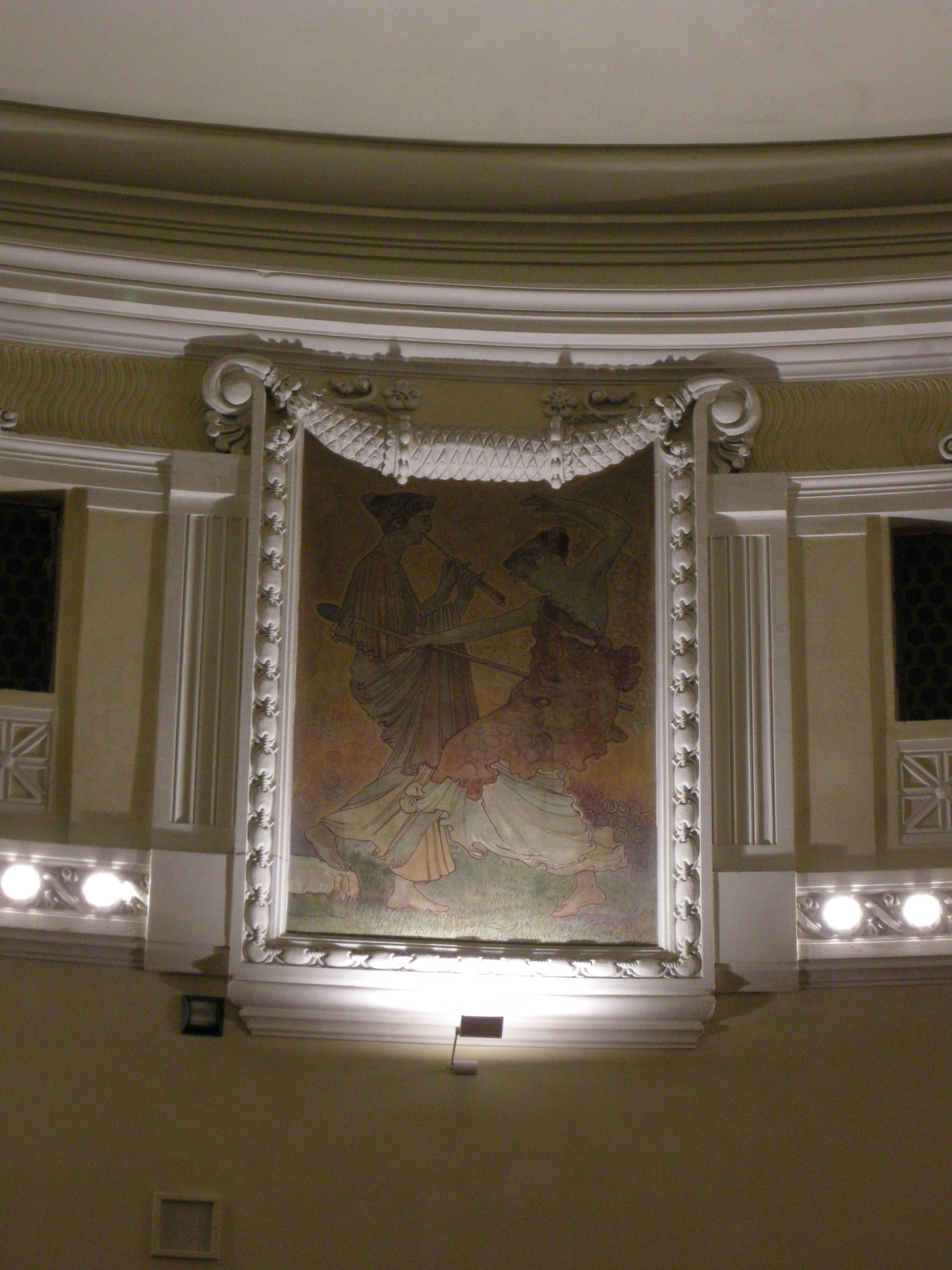 Politeama di prato, pannelli decorativi